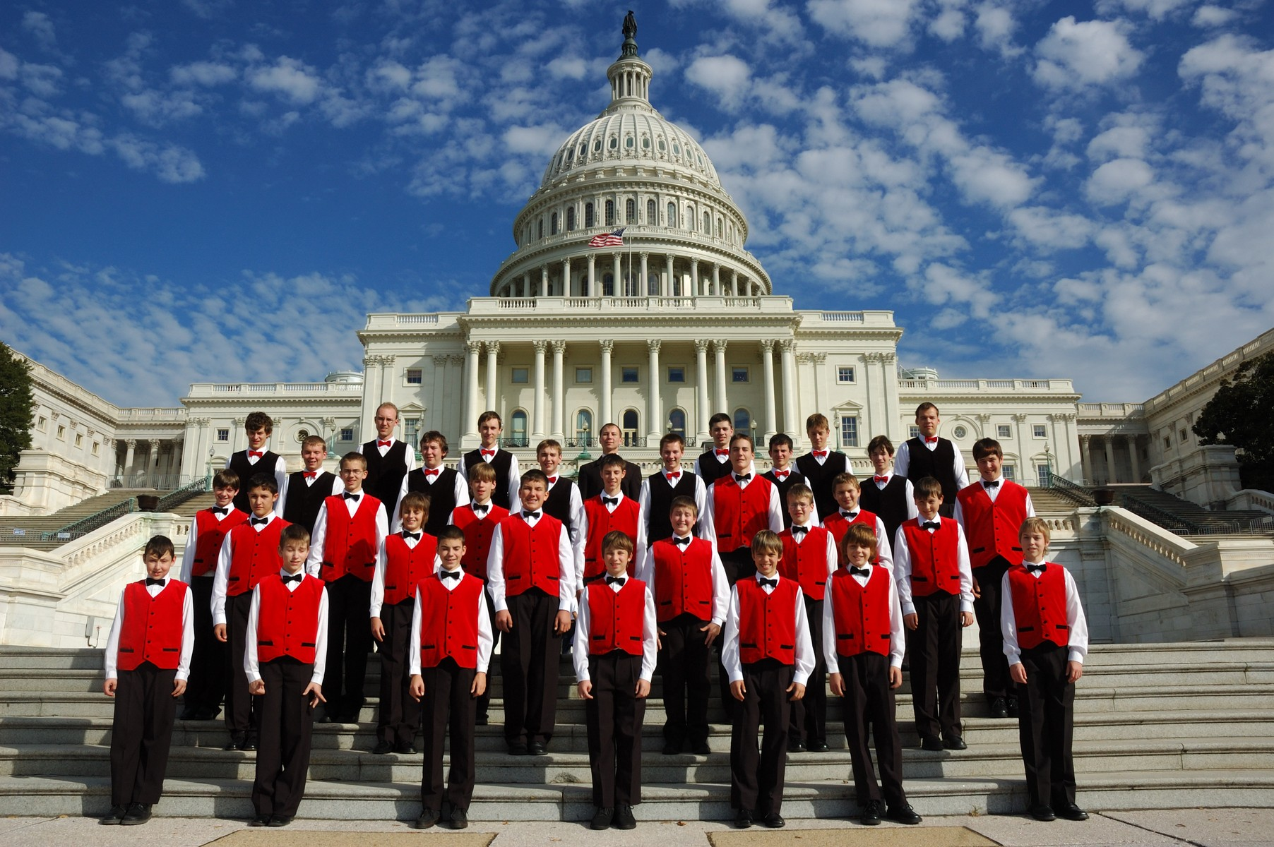 Chlapecký sbor Bonifantes před Kapitolem Spojených států, 2006.